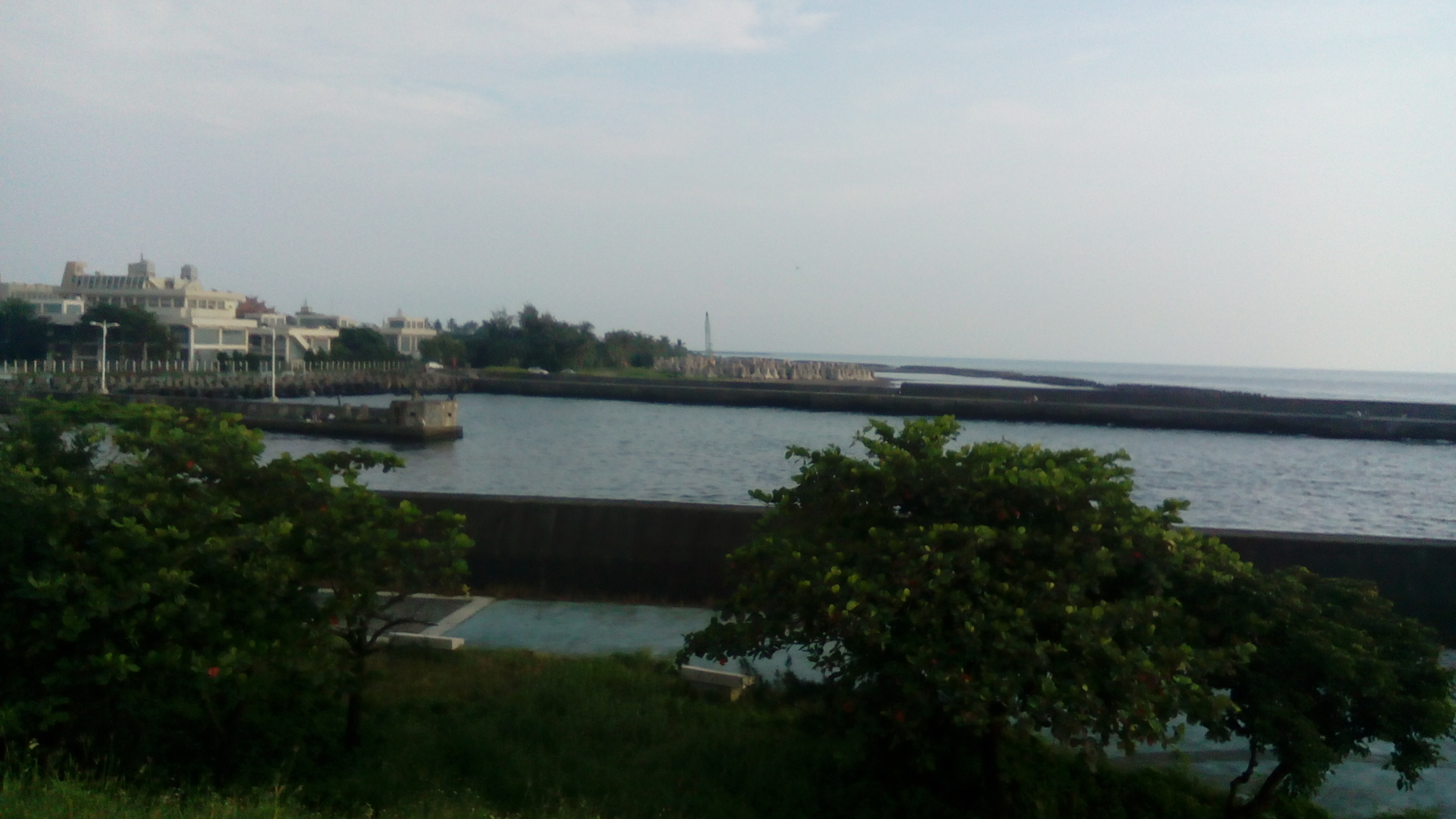 同上